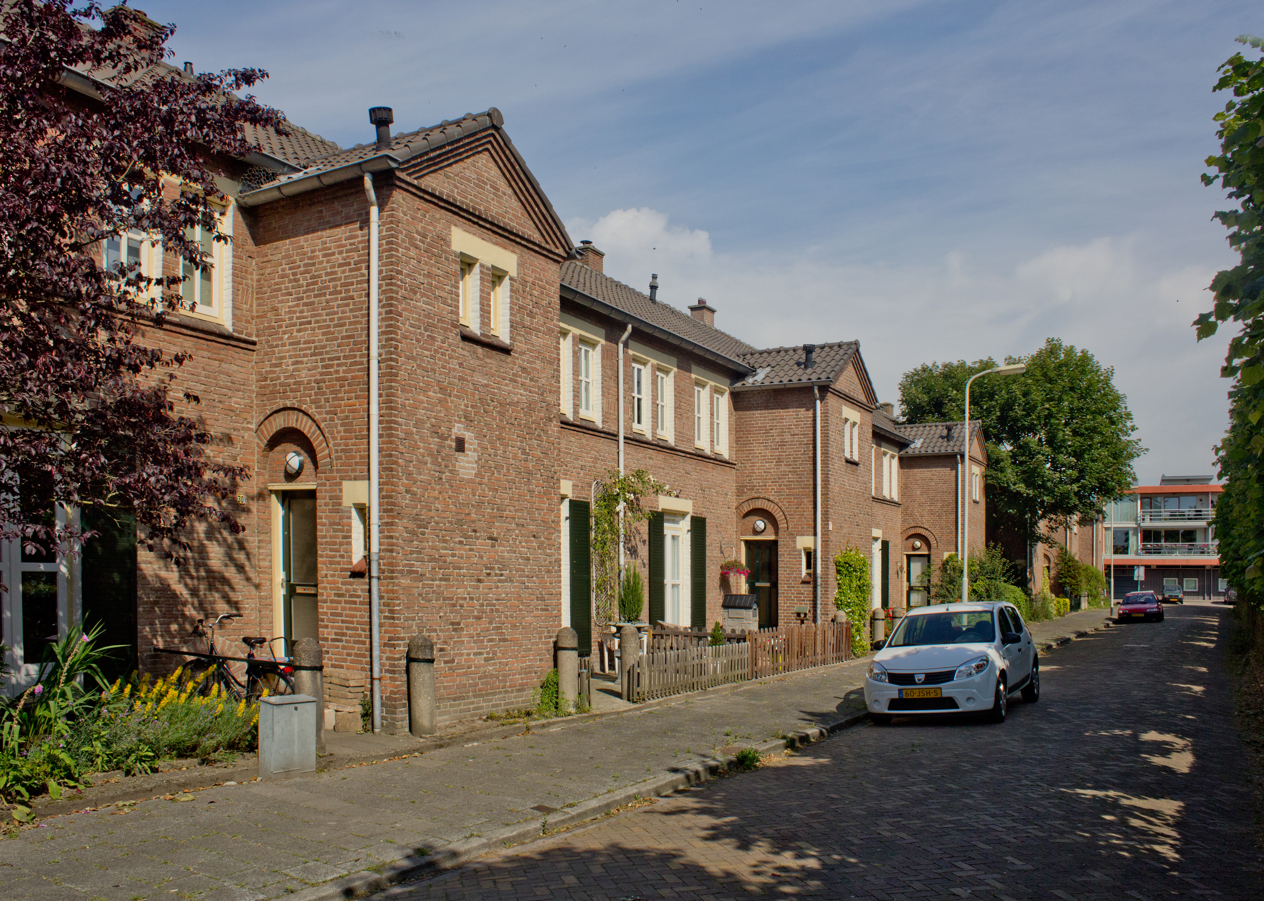 Woningbouw in Bossche Schoolstijl. 1954.